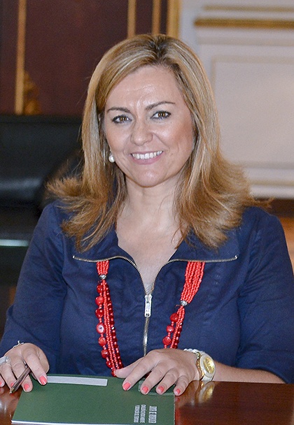 Despacho CMAYOT